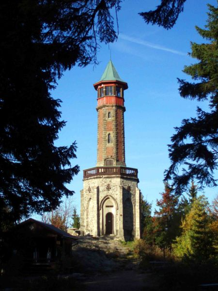 Stefaniewarte